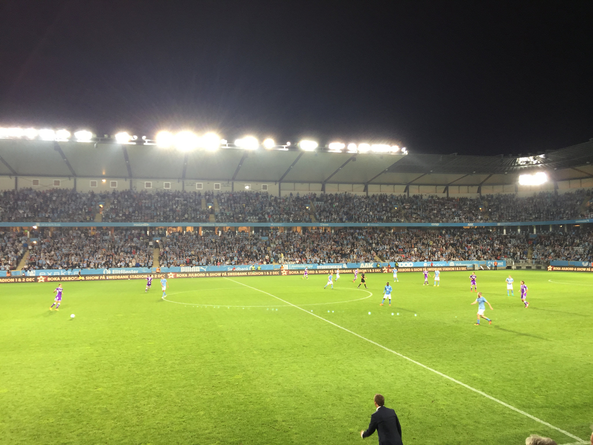 Malmö FF - IFK Göteborg 2016. Allsvenskan, den 12 september 2016